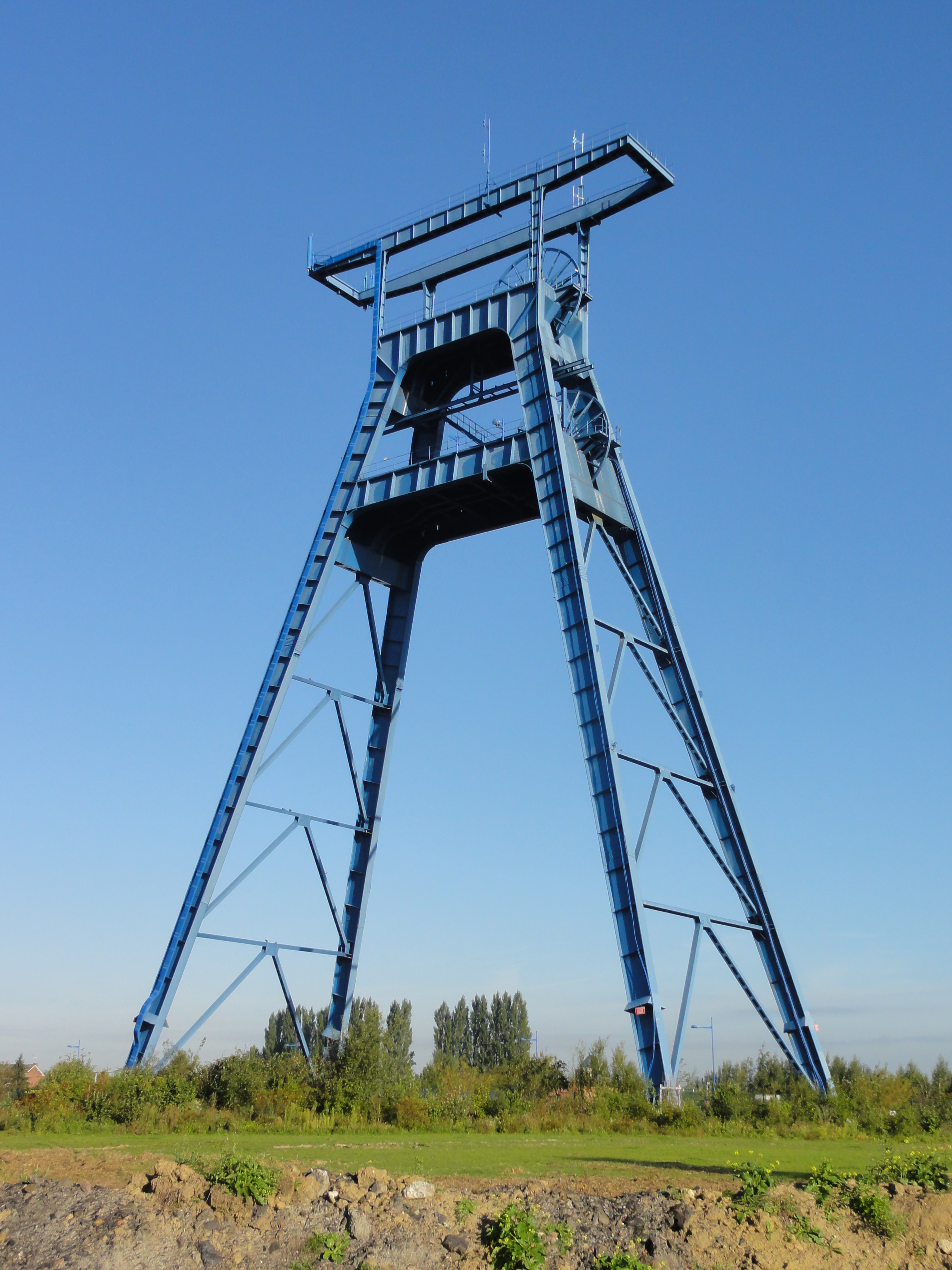 La Fosse n° 9 de la Compagnie des mines de l'Escarpelle était un charbonnage constitué d'un seul puits situé à Roost-Warendin, Nord, Nord-Pas-de-Calais, France.